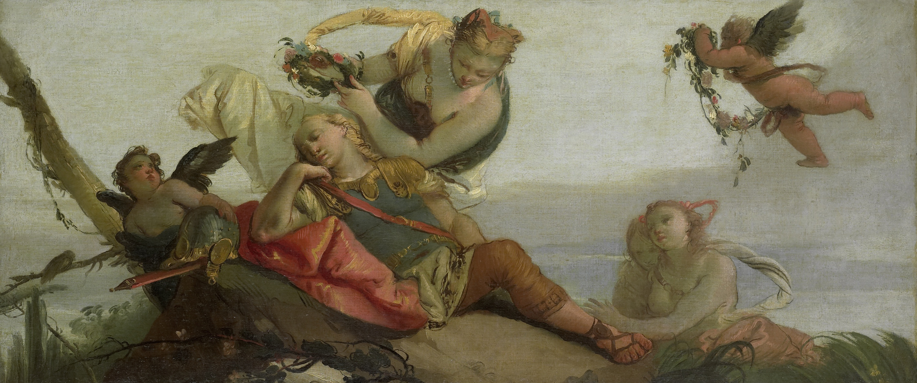 De slapende Rinaldo door Amida met een bloemenkrans gekroond, putti en nimfen zien toe. Gebaseerd op een compositie van Tiepolo. Pendant van SK-A-3436.